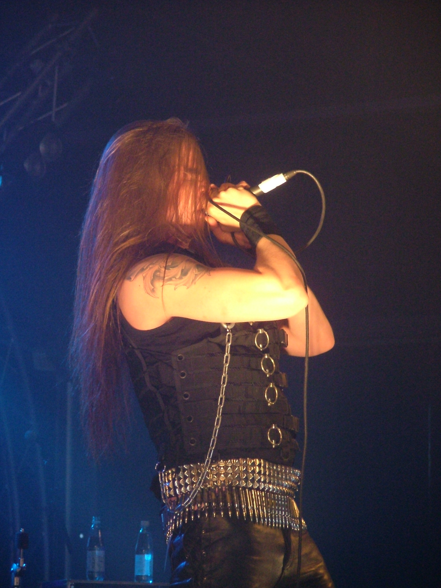 Die finnische Dark-Metal-Band Shade Empire beim Tuska Open Air 2008